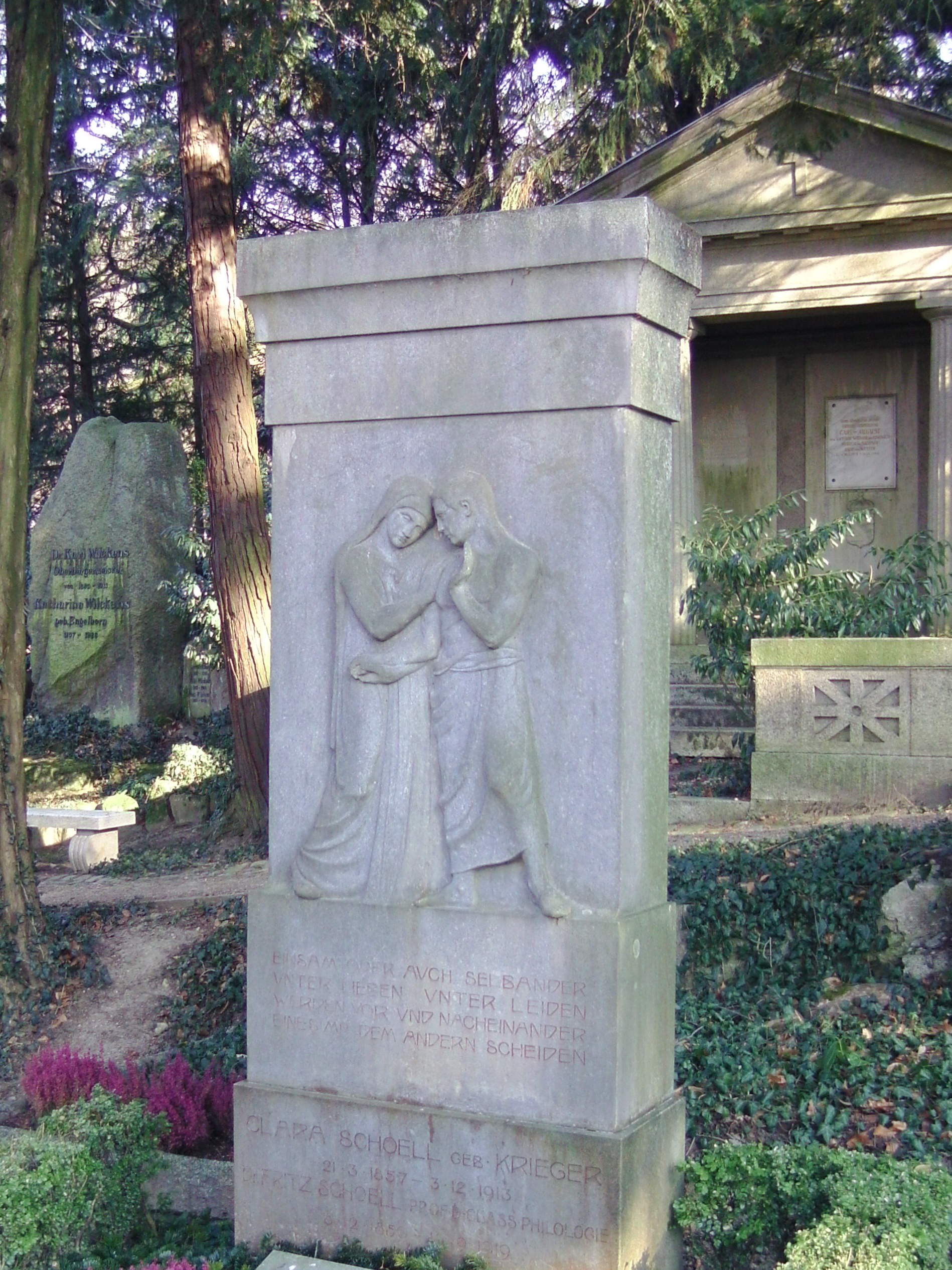 Ensemble: Menhir Grabmal Karl Wilckens, Mausoleum Haus Sachsen-Weimar, Stele im Bild Vordergrund Grabmal Fritz Schöll, (Abt. y) Bergfriedhof